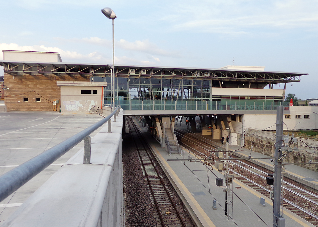 Stazione ferroviaria di Castellanza, il fabbricato viaggiatori visto da ovest